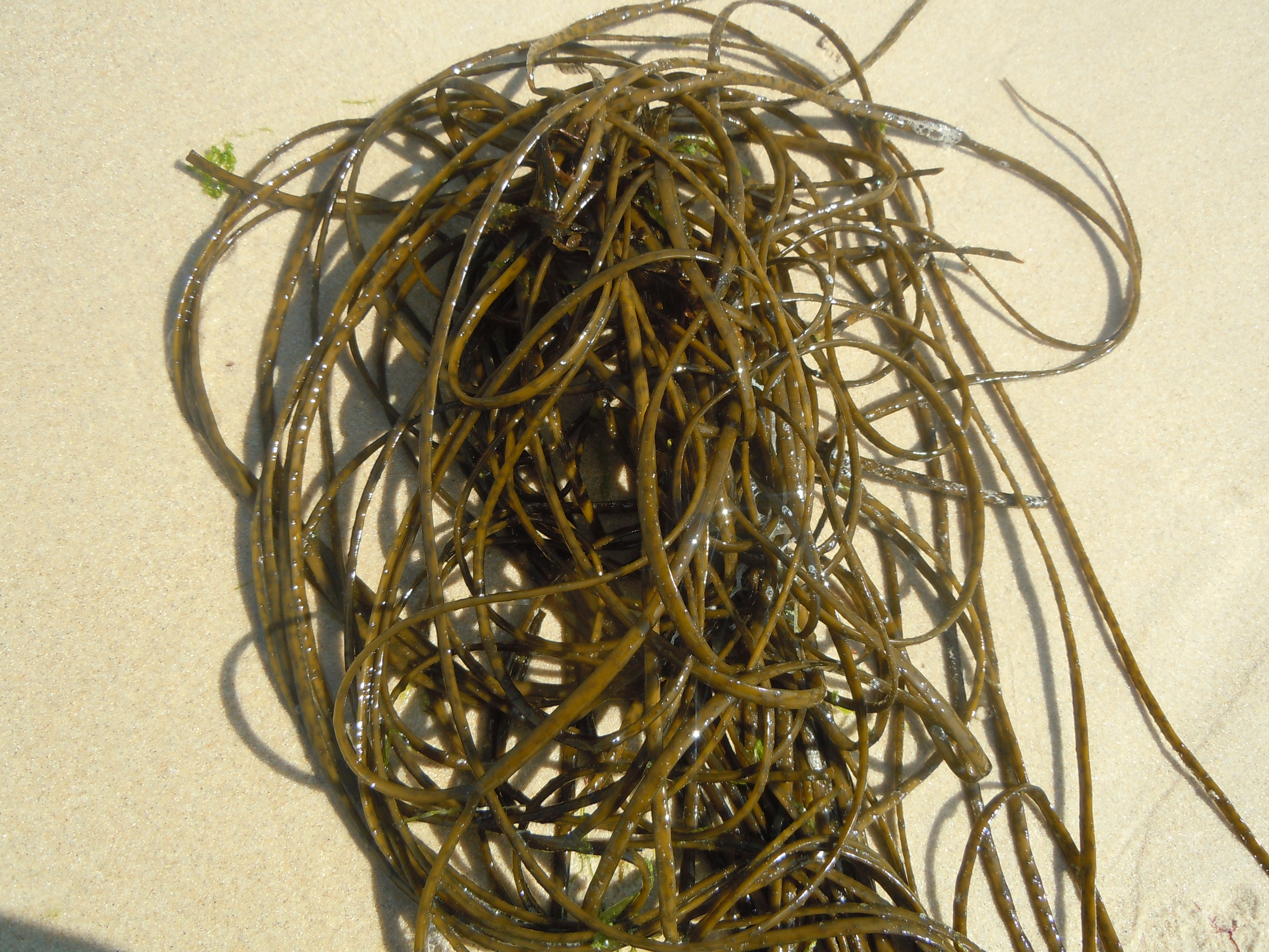 Fil de mer, Chorda filum, dans la laisse marine de la Plage des Grands-Sables (Belle-Île-en-Mer)